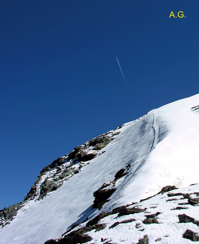 Il ghiacciaio de la Pointe Tersiva - Alpi Graie - Italy